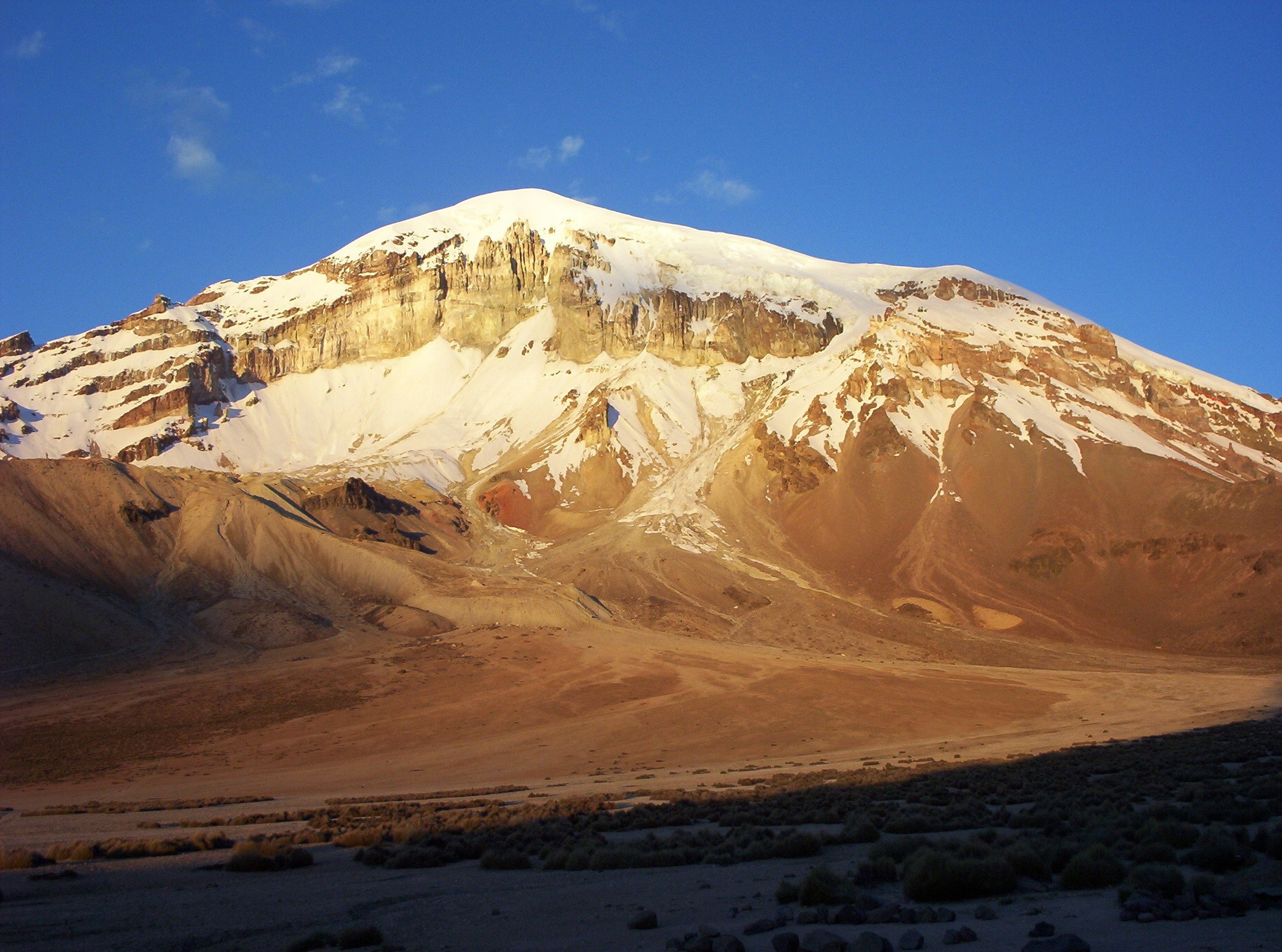 Sajama im Abendlicht